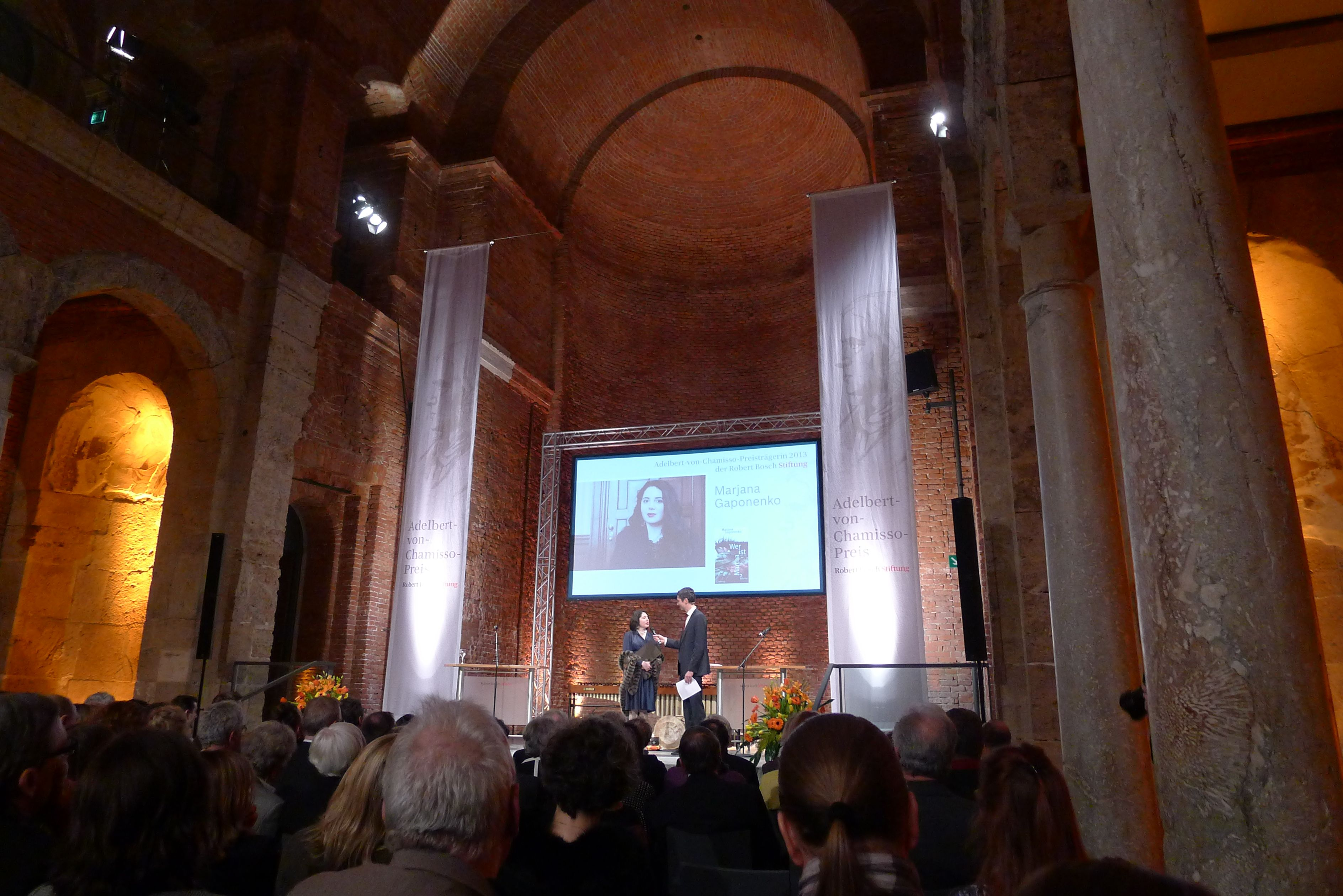 Adelbert-von-Chamisso-Preis 2013. Ingo Zamperoni interviewt die Preisträgerin Marjana Gaponenko